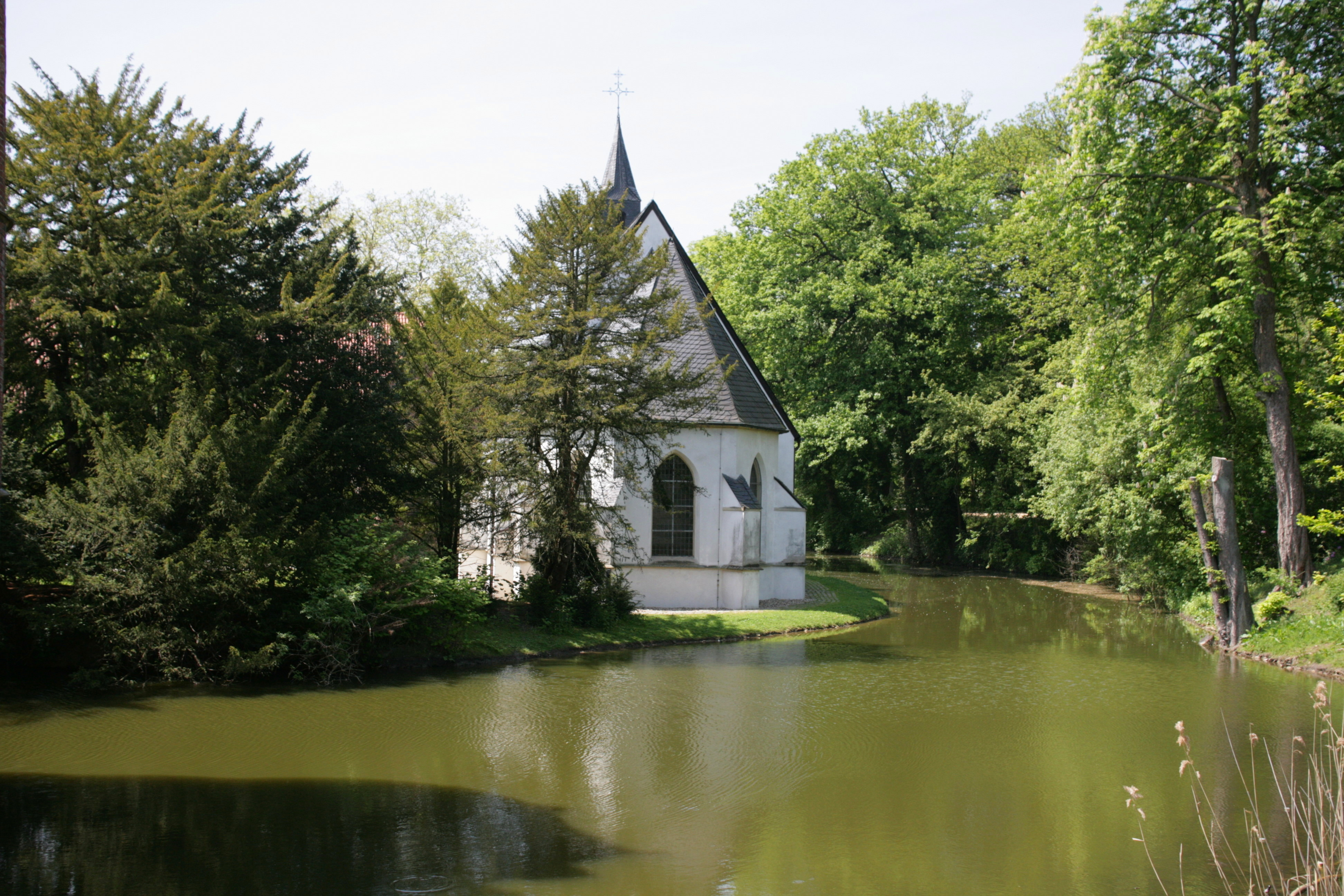 Schlosskapelle bei Schloss Herten, Im Schlosspark 12 in Herten